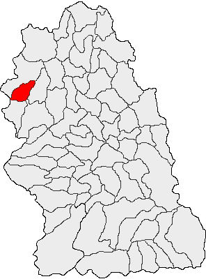 Categorie:Hărţi ale judeţului Hunedoara